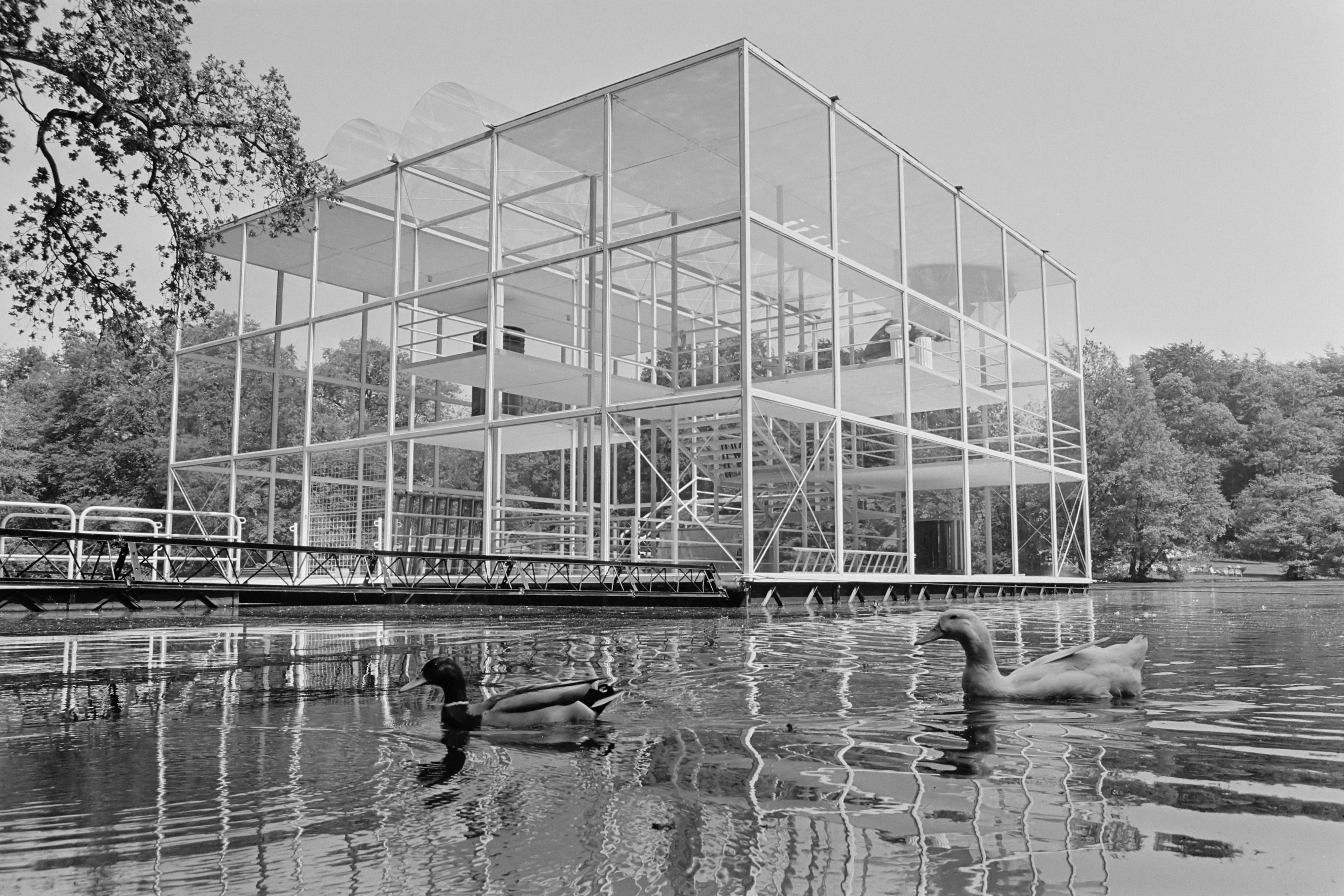 Int. Beeldententoonstelling Sonsbeek 1986 Arnhem binnenkort open; drijvend Paviljoen van Wiek Roling 10 juni 1986